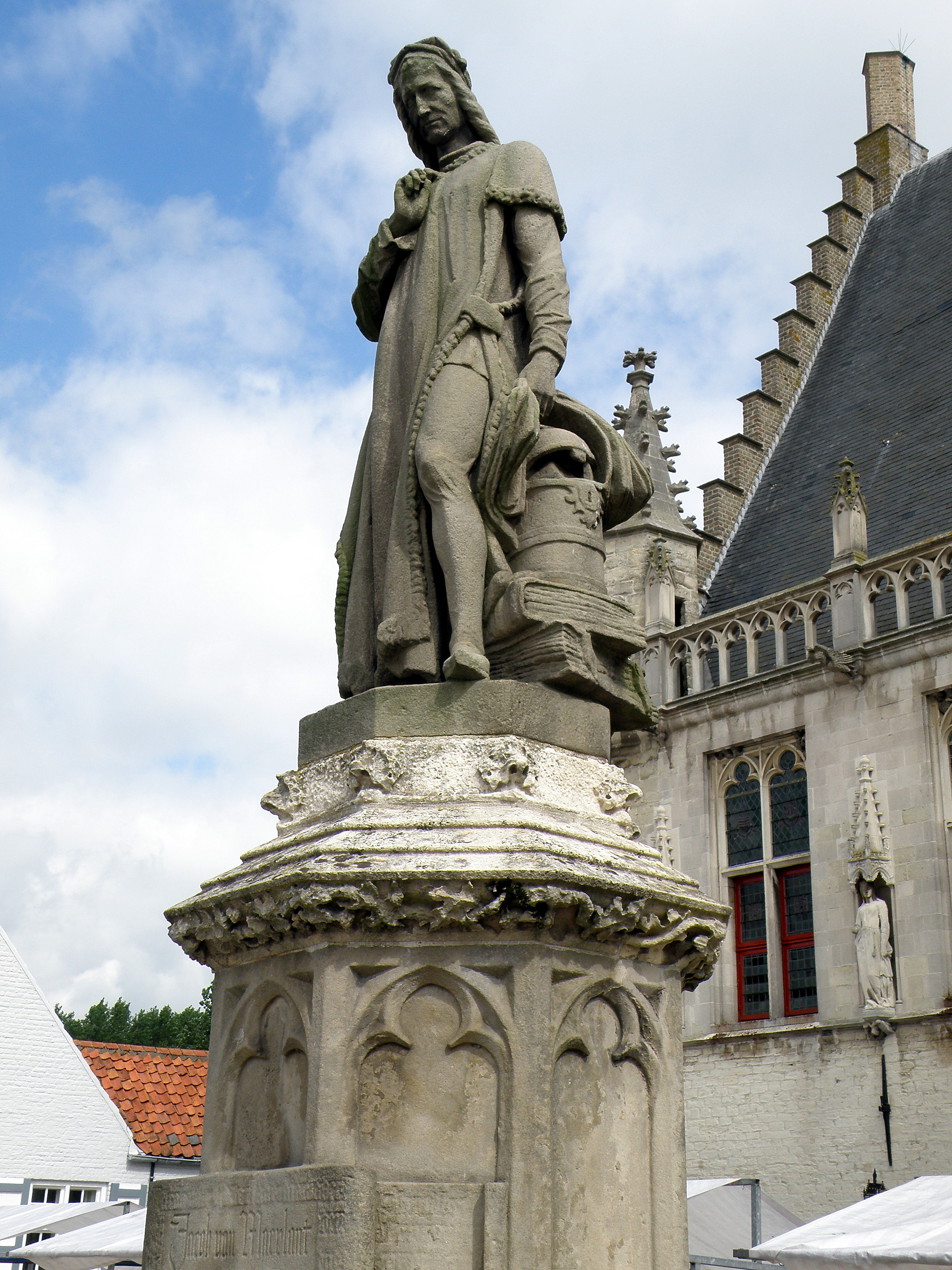 Damme (prov. de Flandre-Occidentale, Belgique). Statue de l'écrivain Jacob van Maerlant sur la Grand'Place.